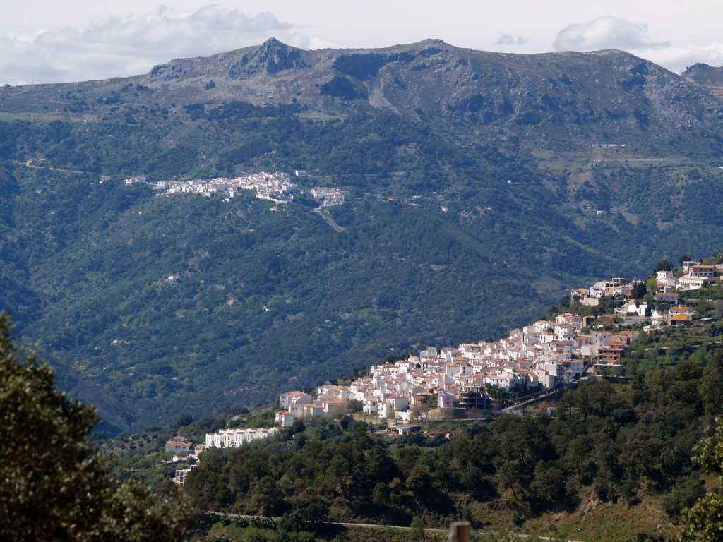 Jubrique en primer plano y al fondo Algatocín, en la Serranía de Ronda, Málaga